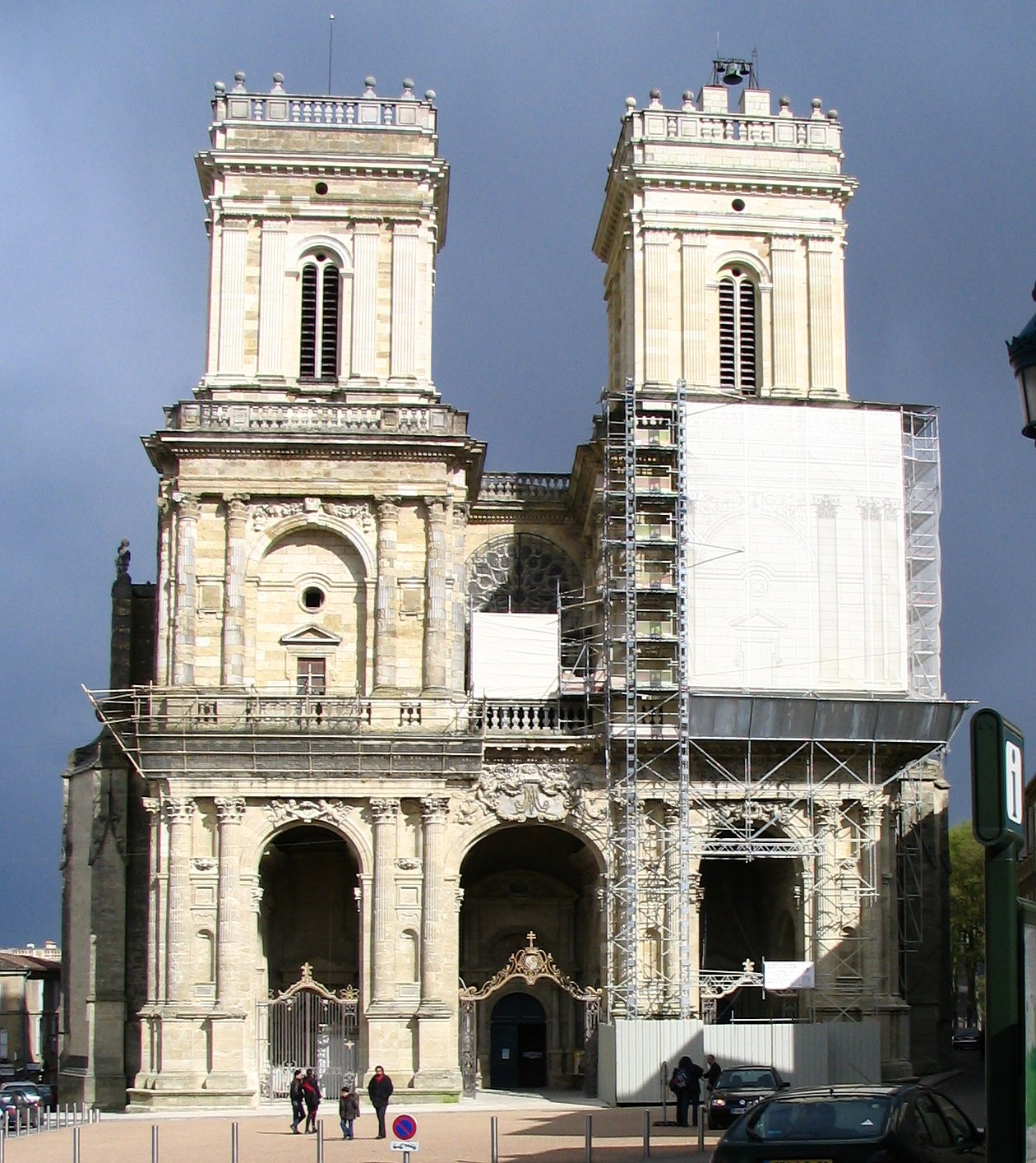 Fachada de la Catedral de Auch durante obras.